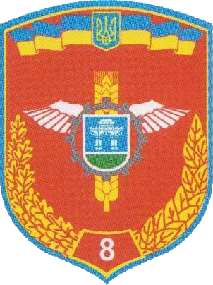 Нарукавний знак, 8 окремий батальйон матеріального забезпечення